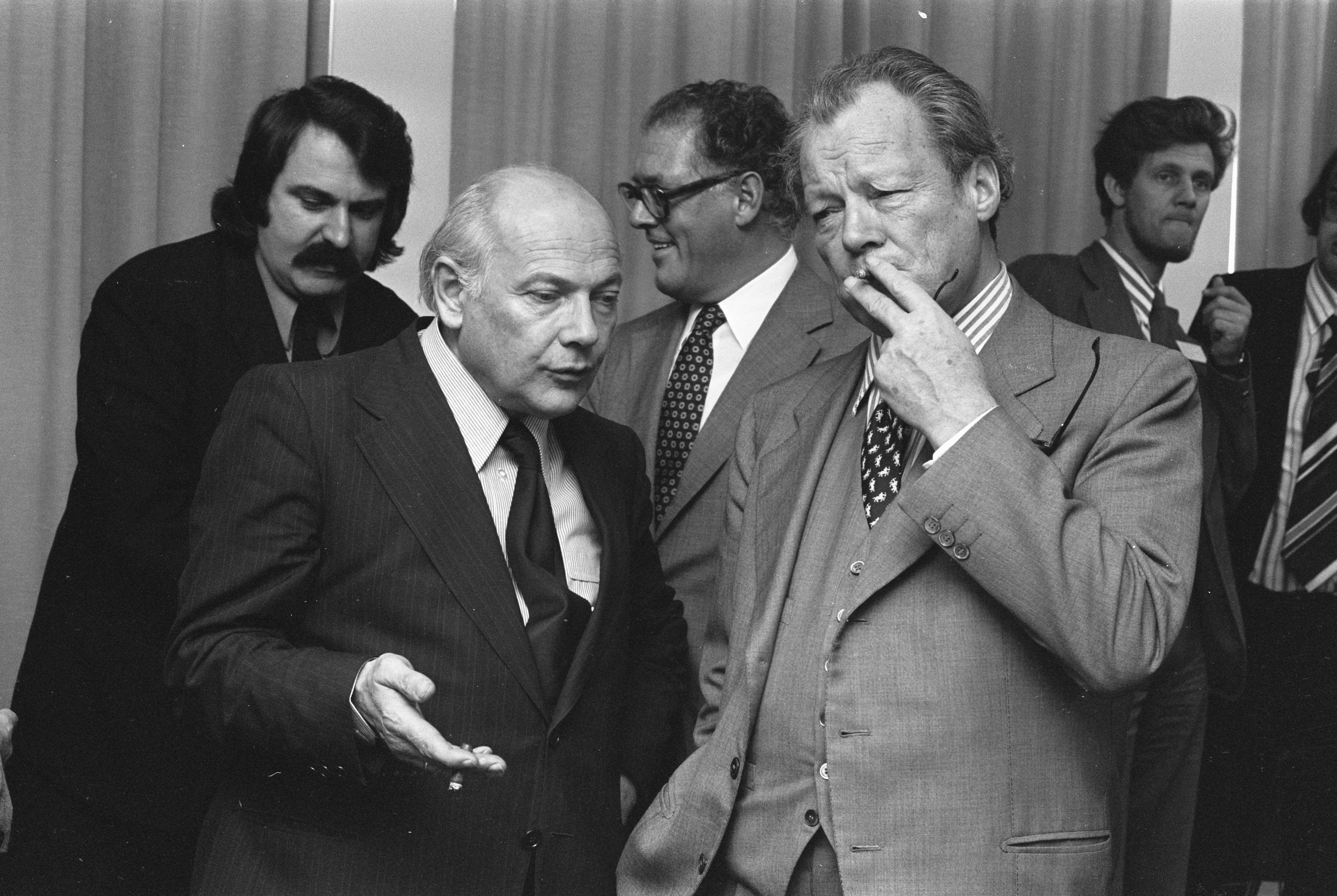 Collectie / Archief : Fotocollectie Anefo Reportage / Serie : [ onbekend ] Beschrijving : Conferentie van leiders sociaal-democratische partijen EEG-landen in Den Haag; premier Den Uyl en ex-bondskanselier Brandt Datum : 1 november 1974 Locatie : Den Haag, Zuid-Holland Trefwoorden : conferenties Persoonsnaam : Brandt, Uyl, Joop den Fotograaf : Peters, Hans / Anefo Auteursrechthebbende : Nationaal Archief Materiaalsoort : Negatief (zwart/wit) Nummer archiefinventaris : bekijk toegang 2.24.01.05 Bestanddeelnummer : 927-5558